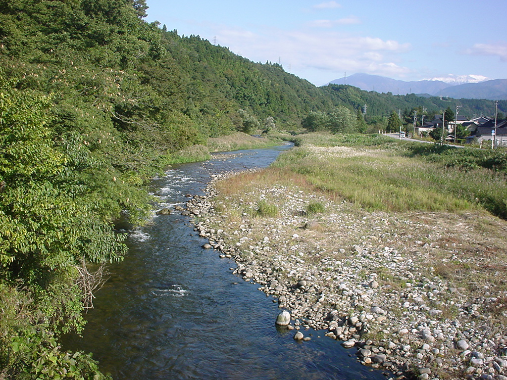 Kumano River in Toyama, Japan. ja: 熊野川（富山県富山市花崎 文華橋（ぶんかはし）より上流方向撮影）